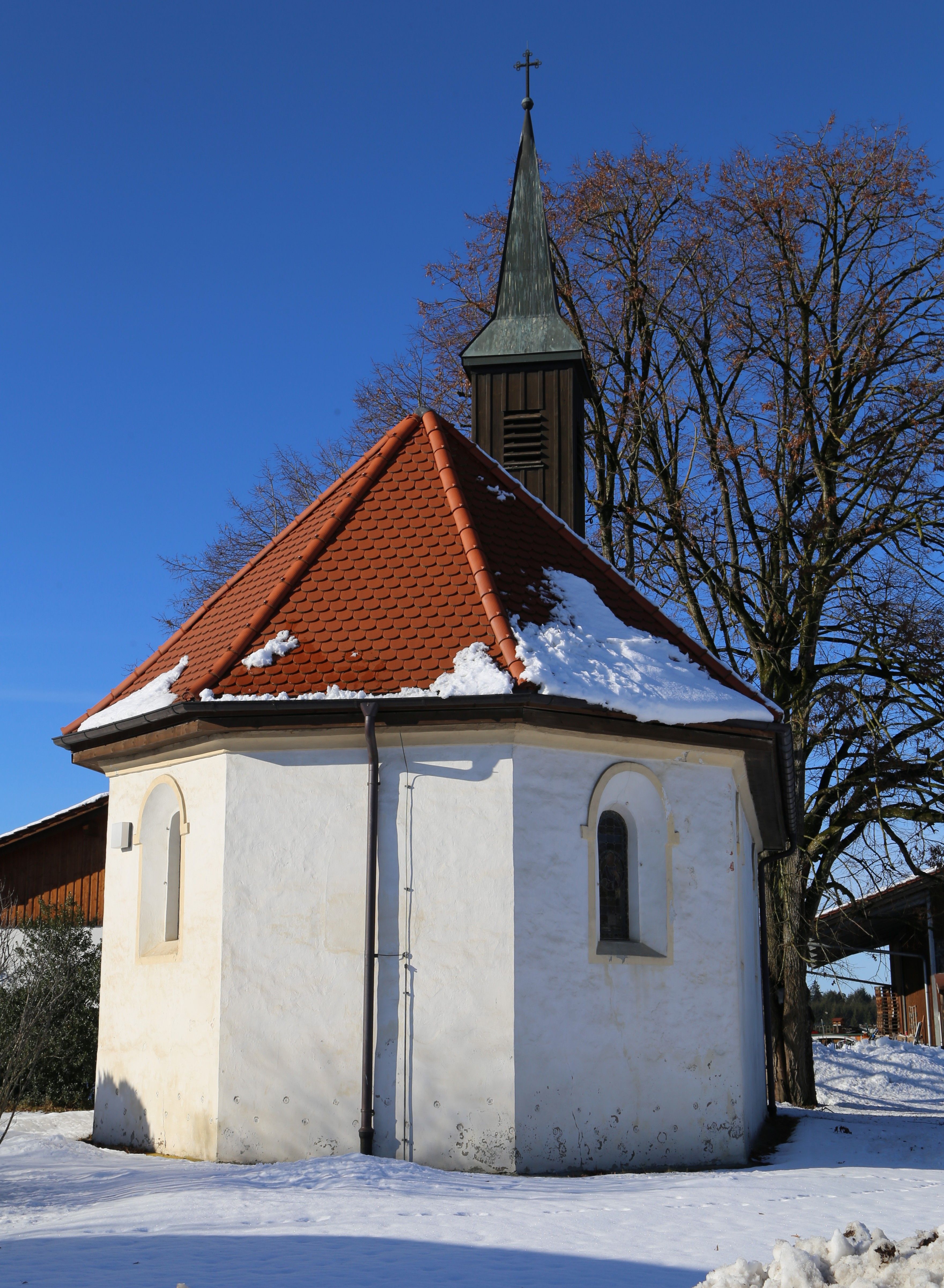 Kirchstockach, Brunnthal; Katholische Filialkirche St. Georg, einschiffiger flacher Bau mit polygonalem Chorschluss und hölzernem Dachreiter, im Kern wohl um 1630, nach Brand 1833 wiederaufgebaut, Dachreiter 1871; mit Ausstattung